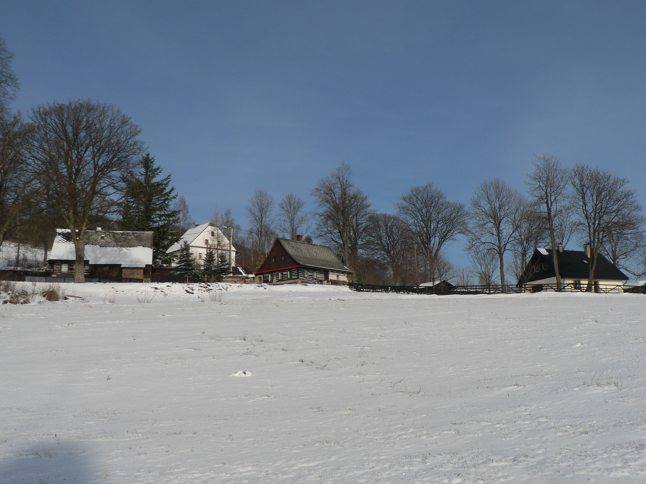 Horní část obce Vojtíškov